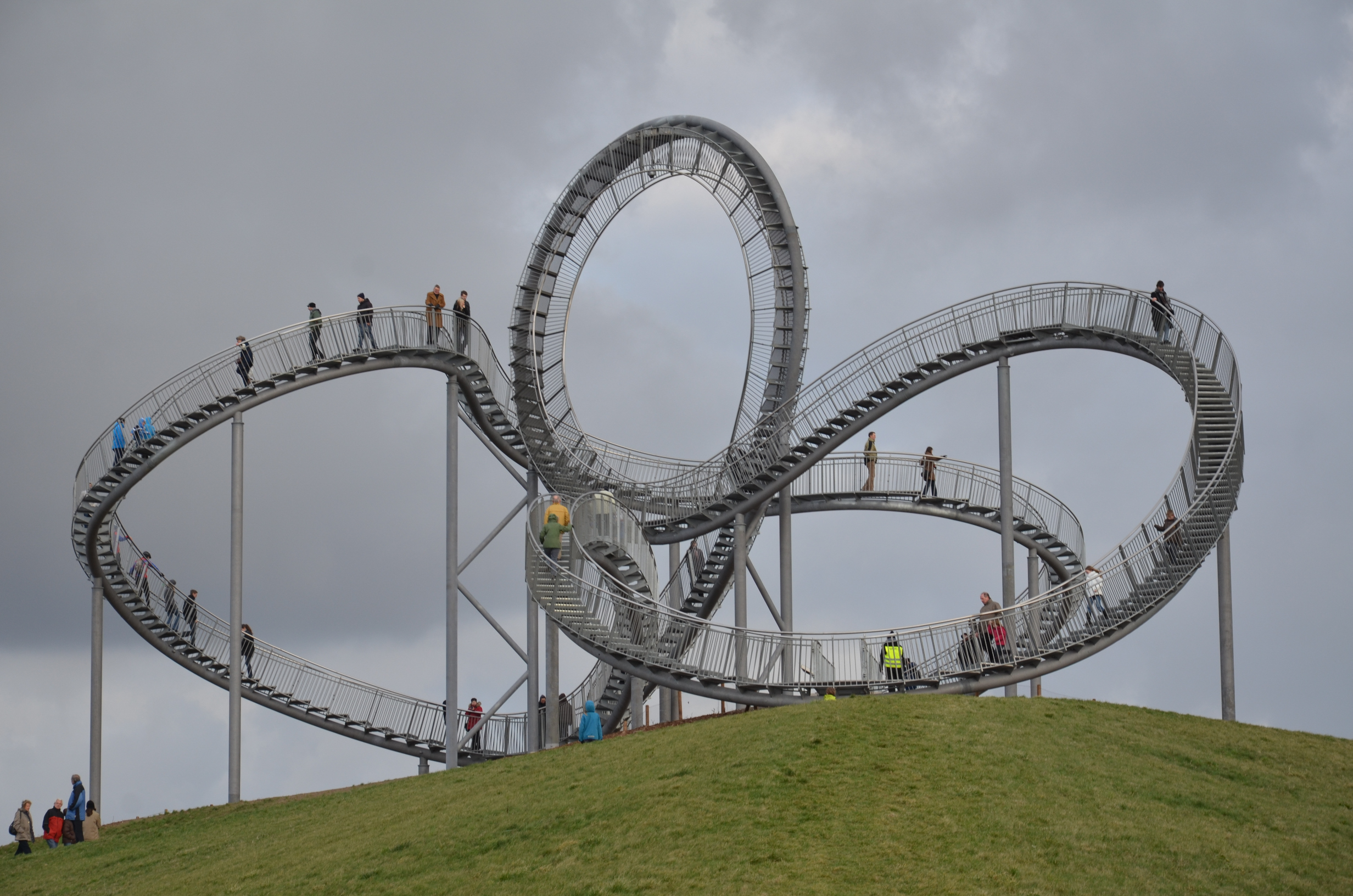 Tiger&Turtle Anfang 2012 auf der Heinrich-Hildebrand-Höhe im Angerpark in Duisburg. Ansicht aus Südwesten